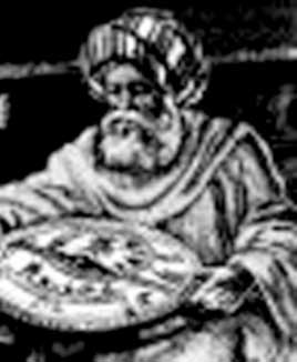 Sujet: Al Battani Source: wikipedia Lizenz